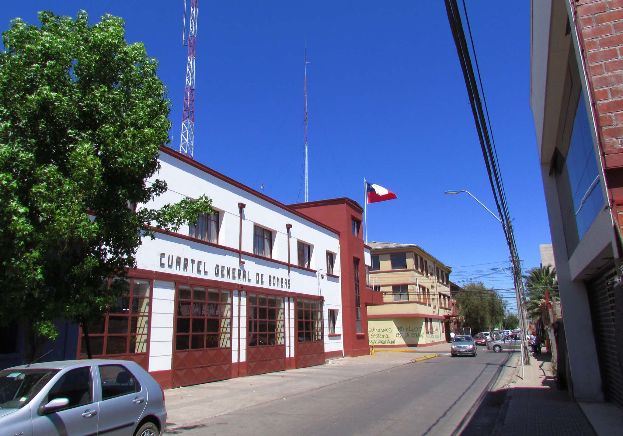 cuartel de bombas